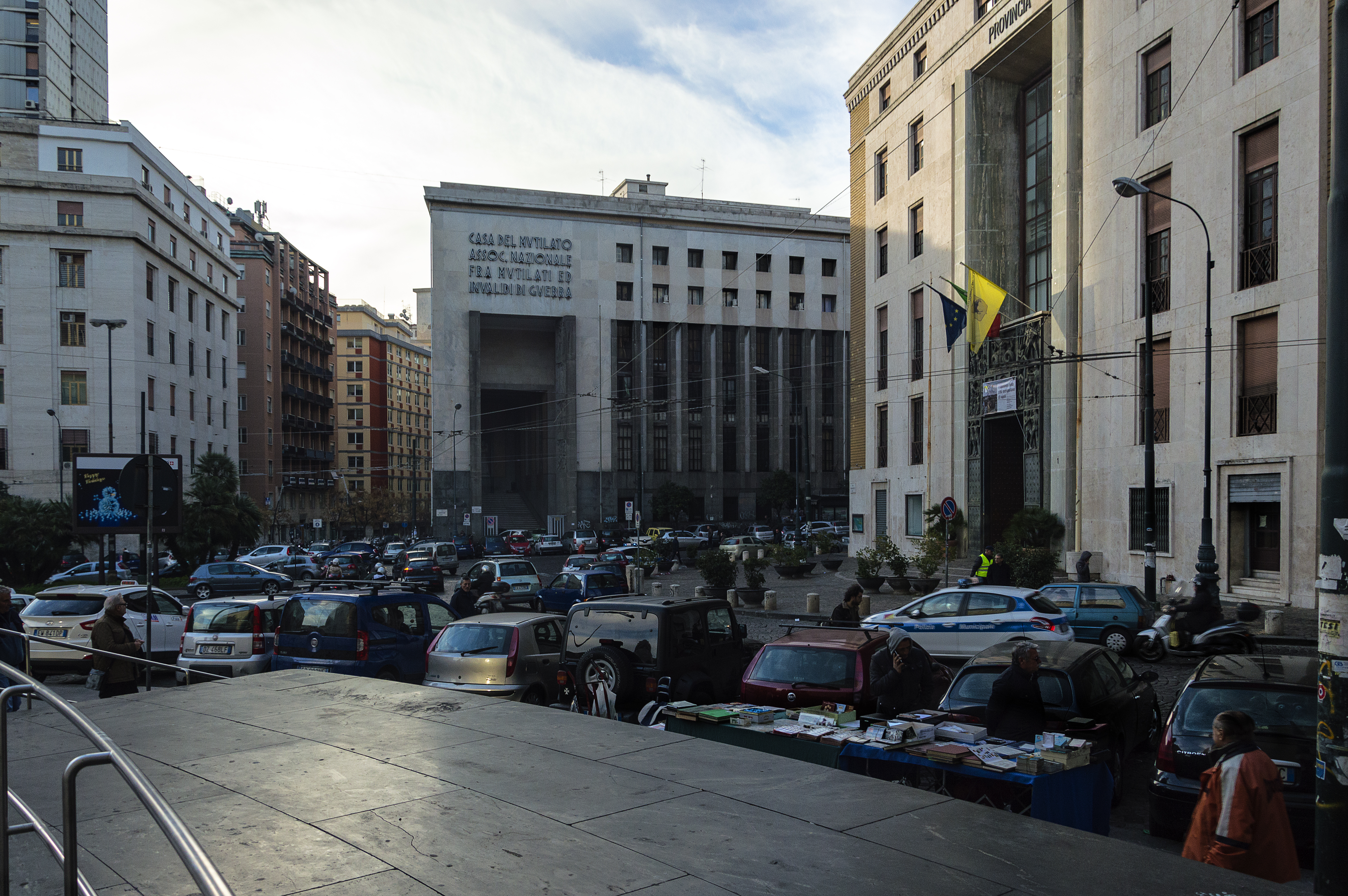 Prospetto dal palazzo delle Poste